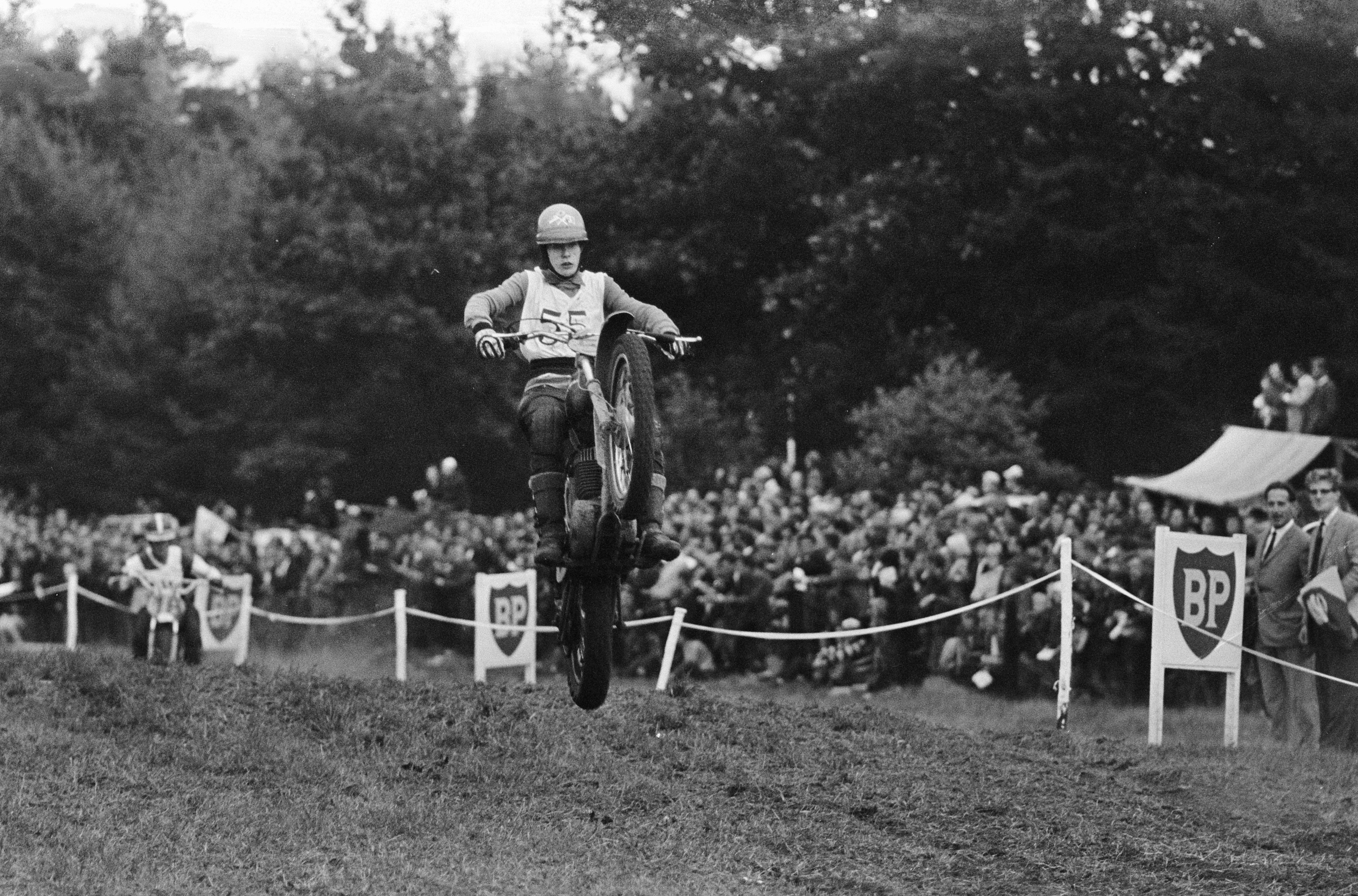 Collectie / Archief : Fotocollectie Anefo Reportage / Serie : [ onbekend ] Beschrijving : Motorcross Des Nations 1967 te Markelo. Renners in aktie Datum : 3 september 1967 Locatie : Markelo Trefwoorden : Motorcross Fotograaf : Koch, Eric / Anefo Auteursrechthebbende : Nationaal Archief Materiaalsoort : Negatief (zwart/wit) Nummer archiefinventaris : bekijk toegang 2.24.01.05 Bestanddeelnummer : 920-6730 Reacties Geplaatst door wieb van de pol op 26 mei 2011 - 20:37. frans sigmans op de voorgrond,nummer 55